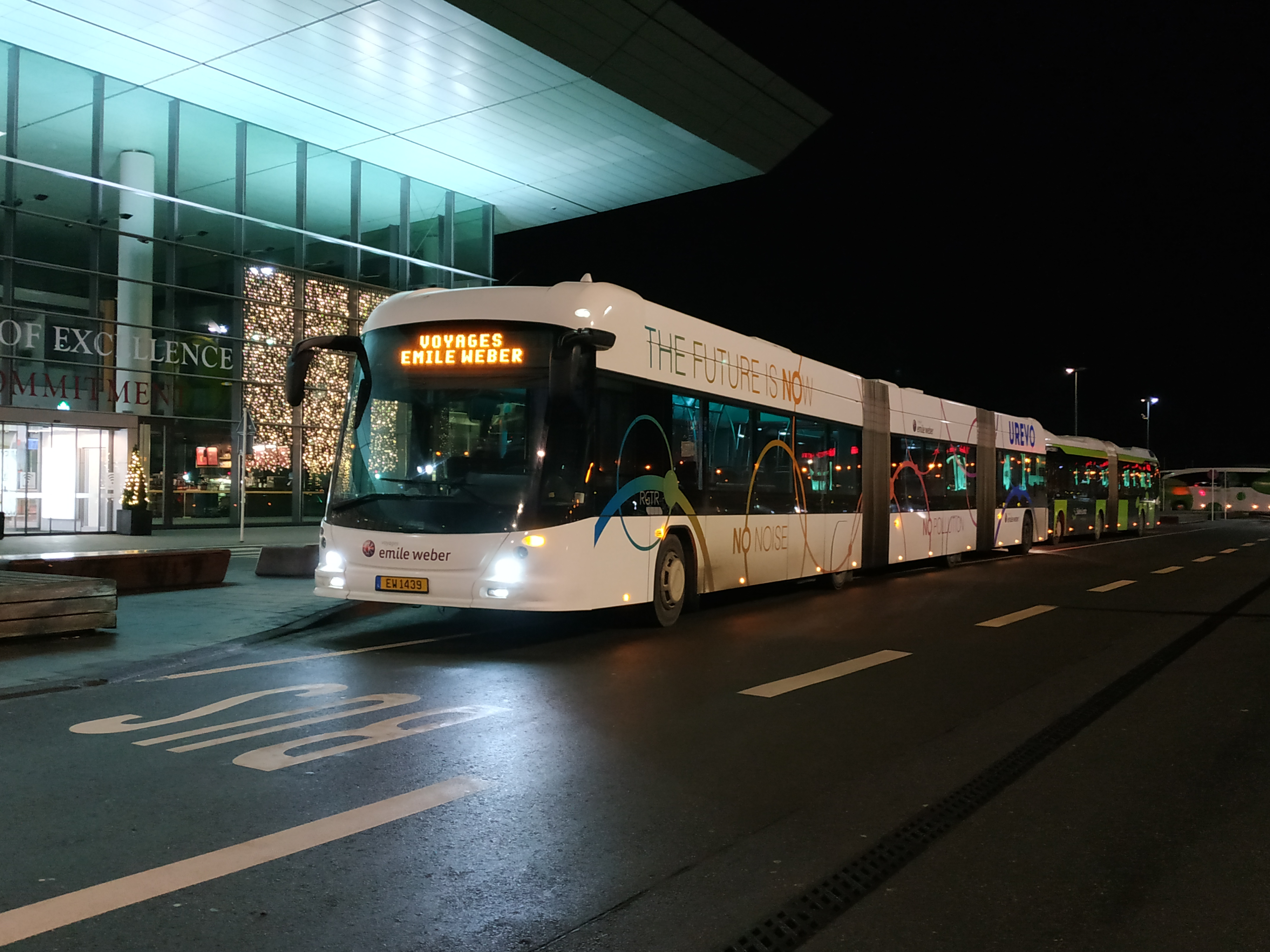 Autobus Hess lighTram Hybrid sur la ligne 16, desservant l'aéroport de Findel